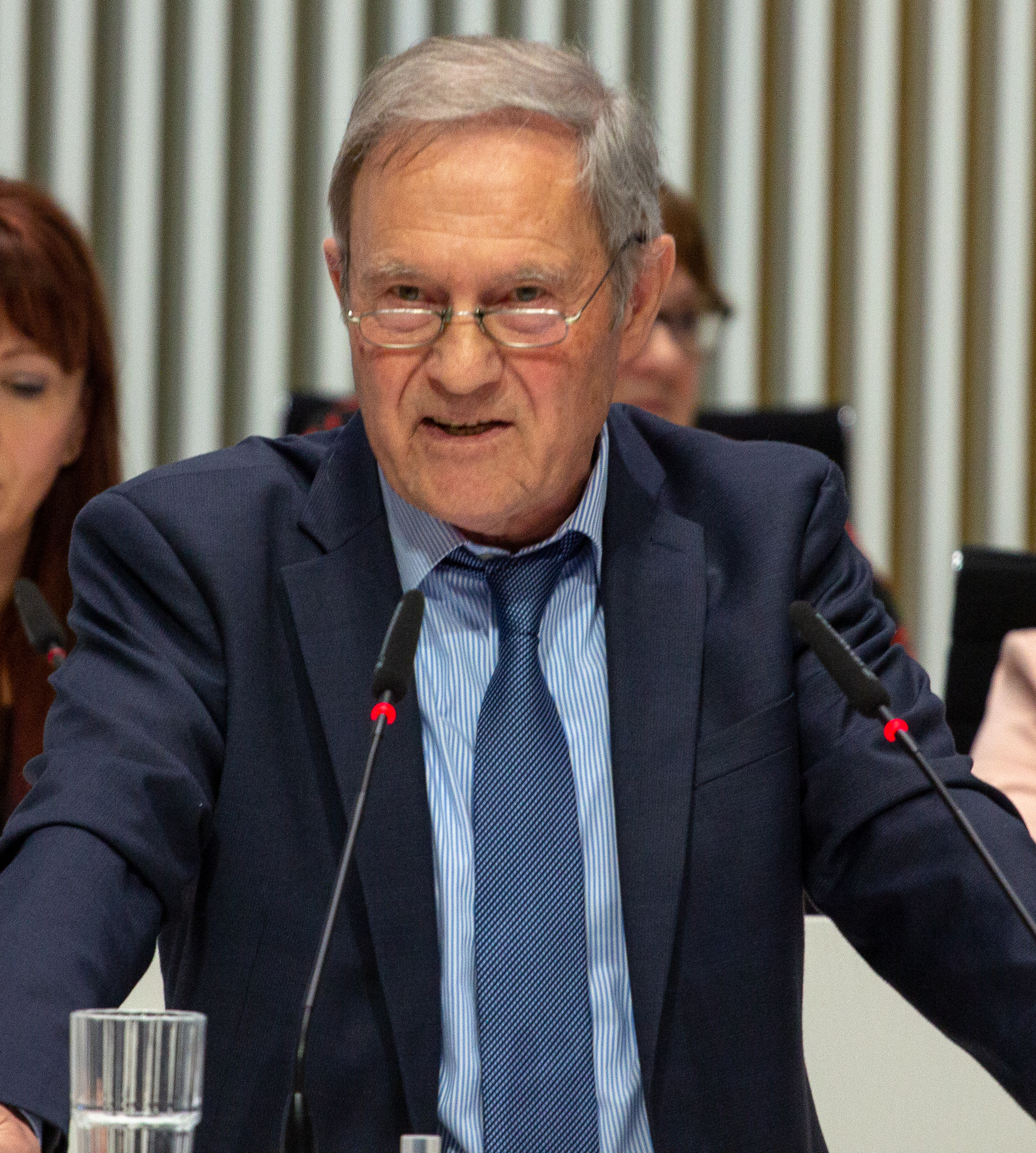 Horst Förster im Plenum des Landtages Mecklenburg-Vorpommern im März 2019.